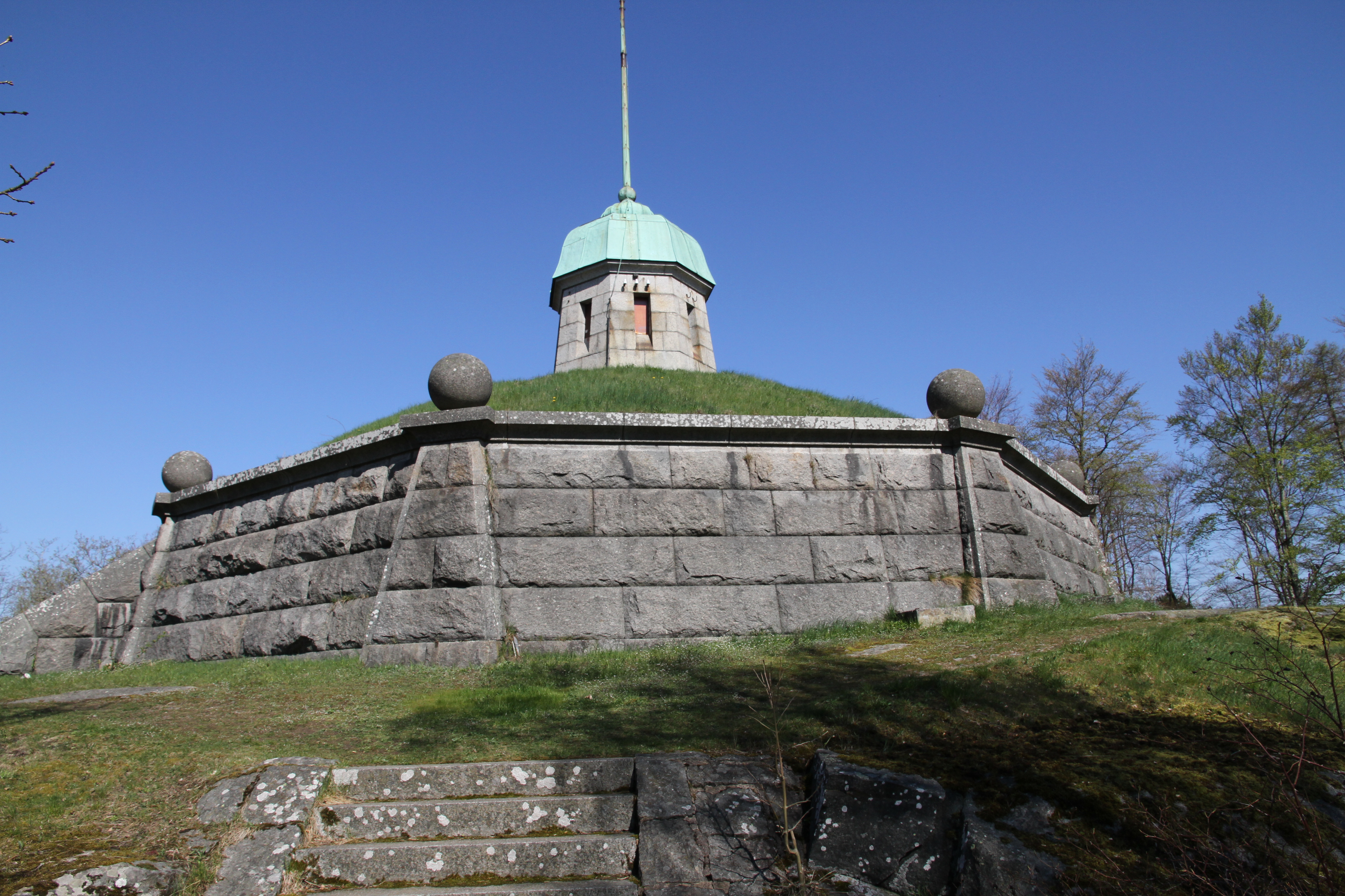 Karlshamns gamla vattentorn